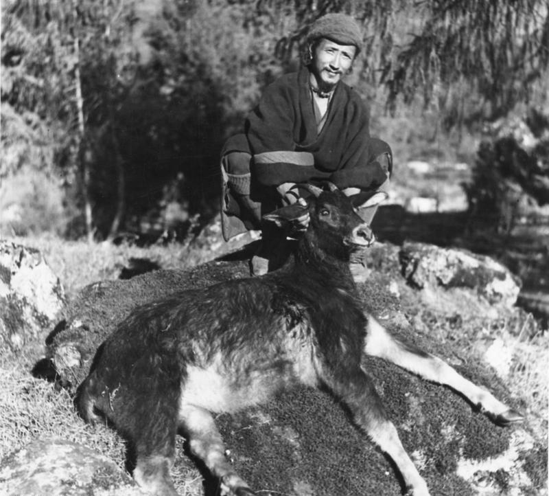 Lachung-Serau